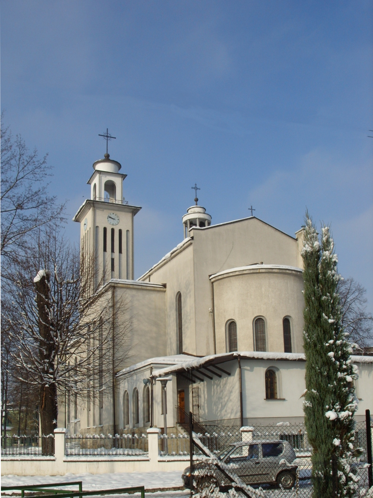 kościół św. Floriana, Żywiec